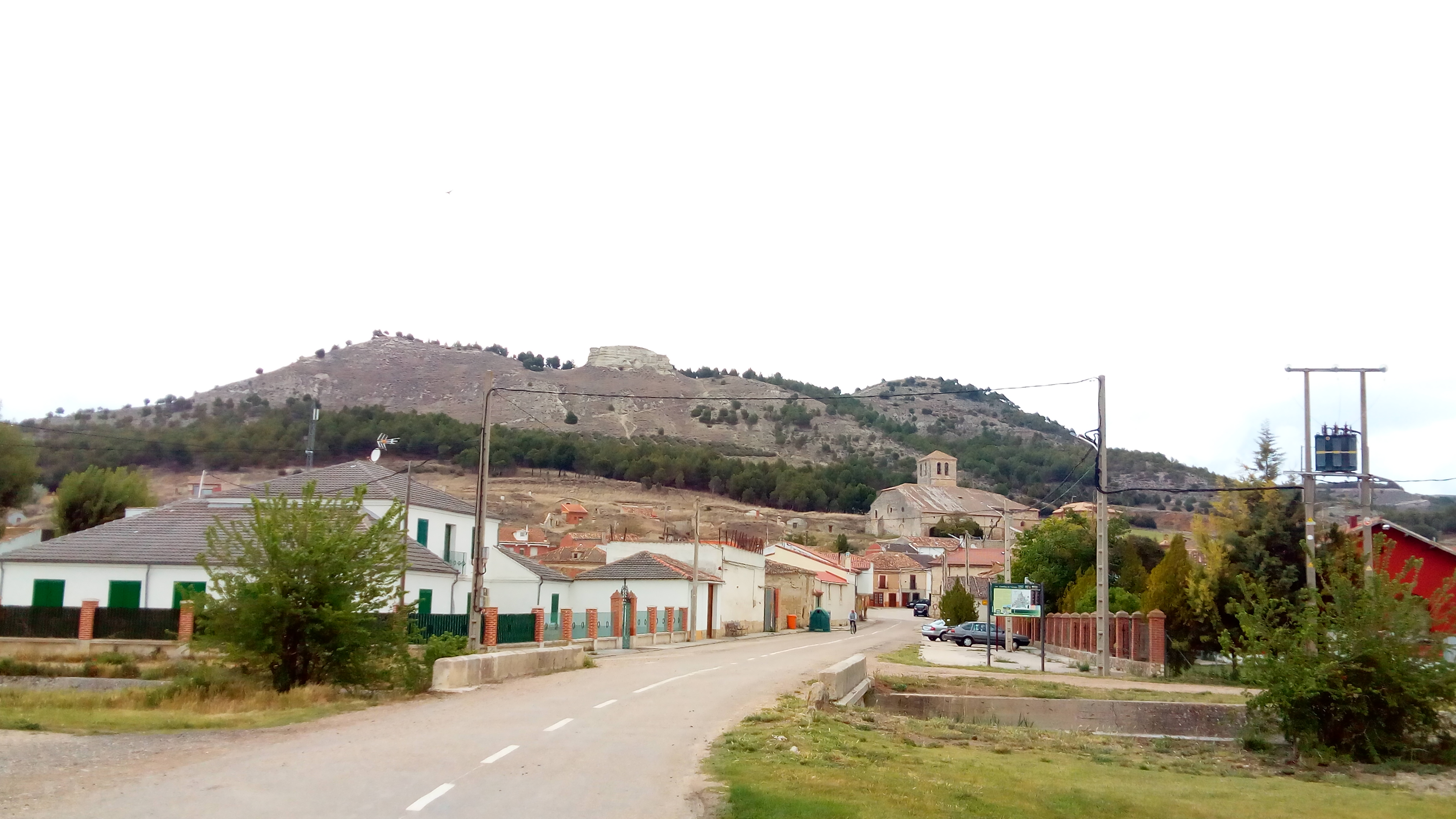 El Cerrato